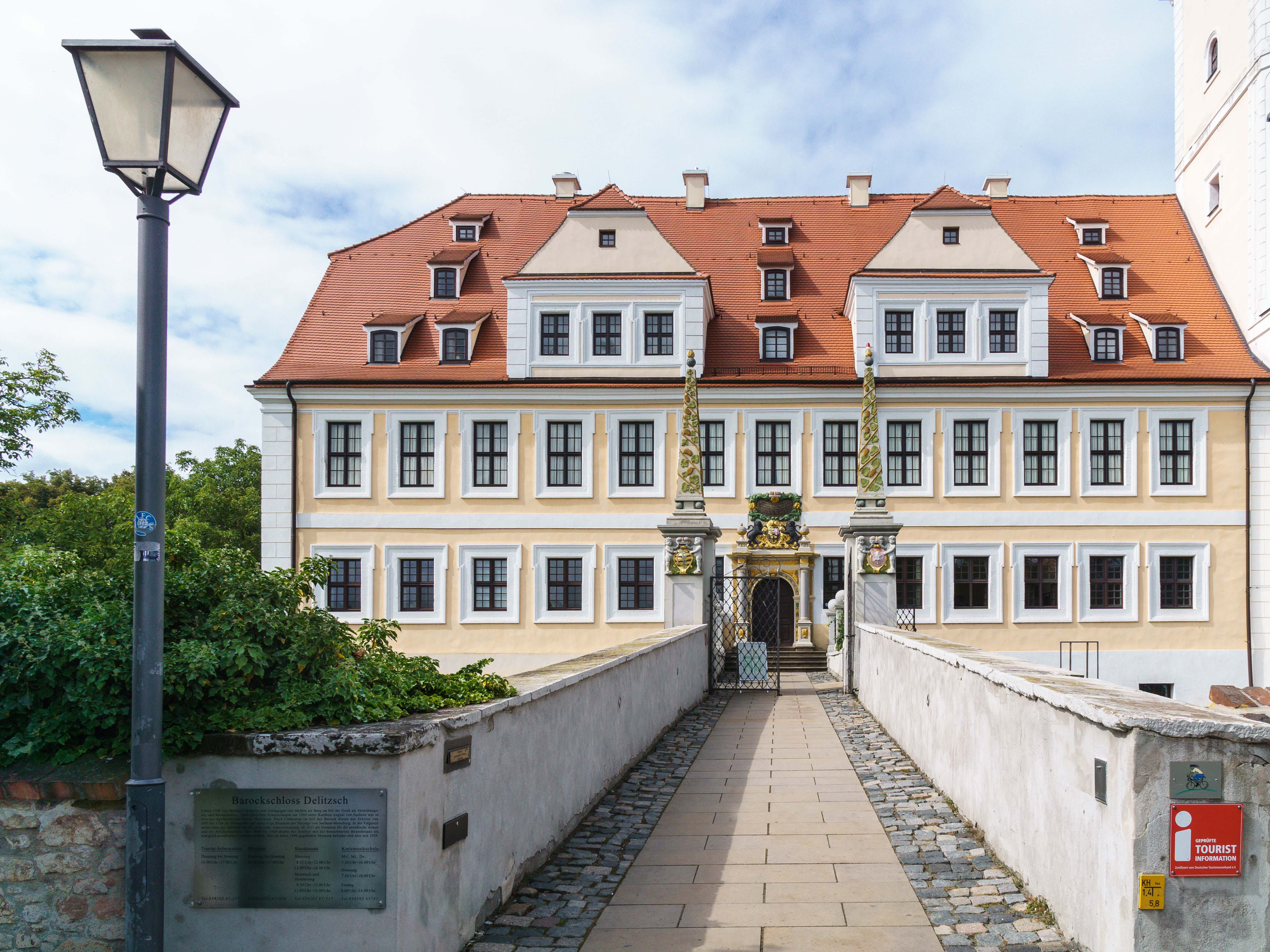 Eingangsbereich Barockschloss in Delitzsch